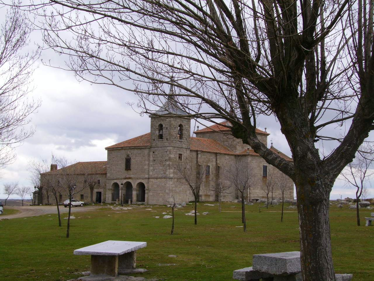 Realizada en abril de 2007